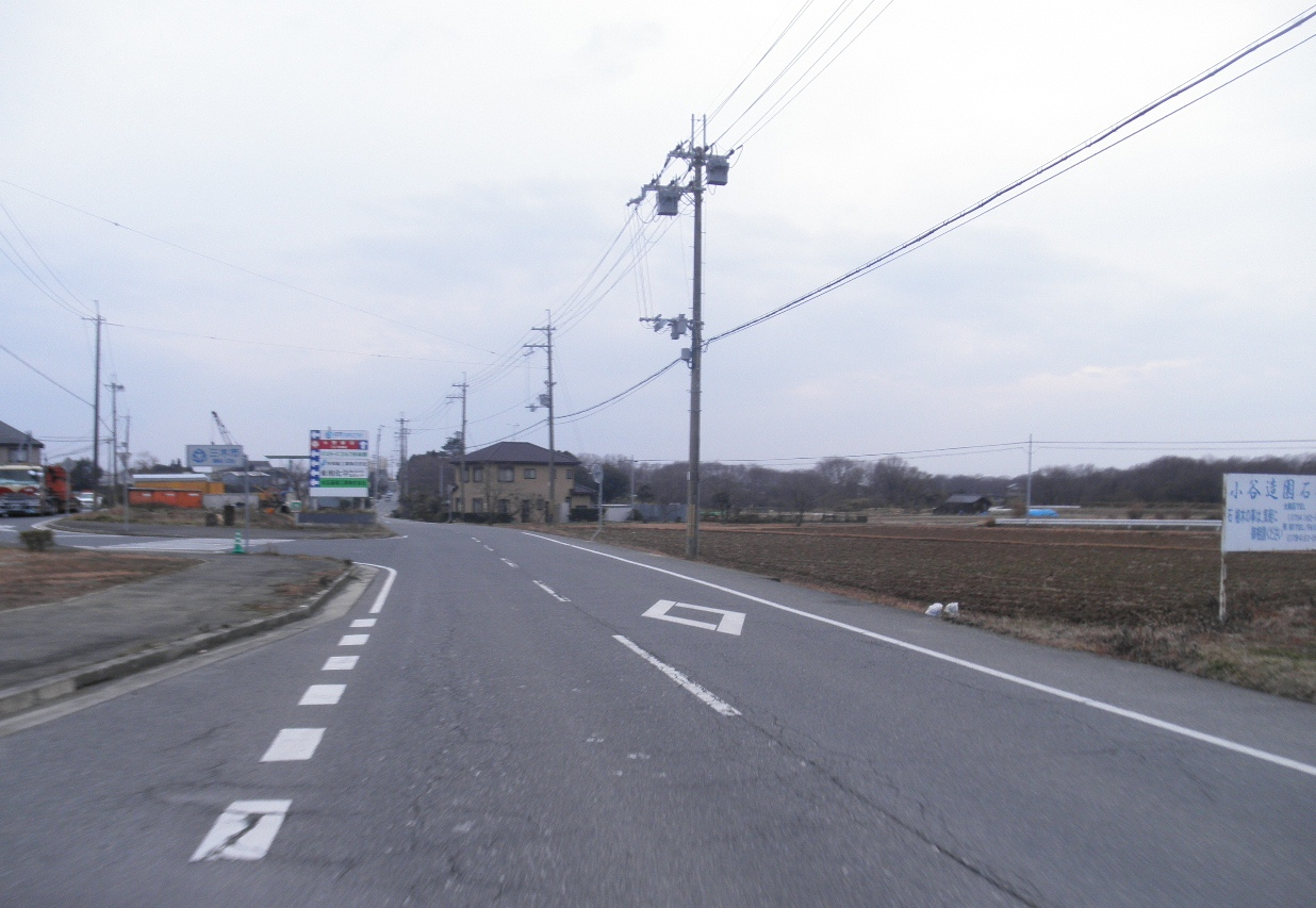 兵庫県三木市加佐 兵庫県道510号万勝寺久留美線 三木市のカントリーサイン